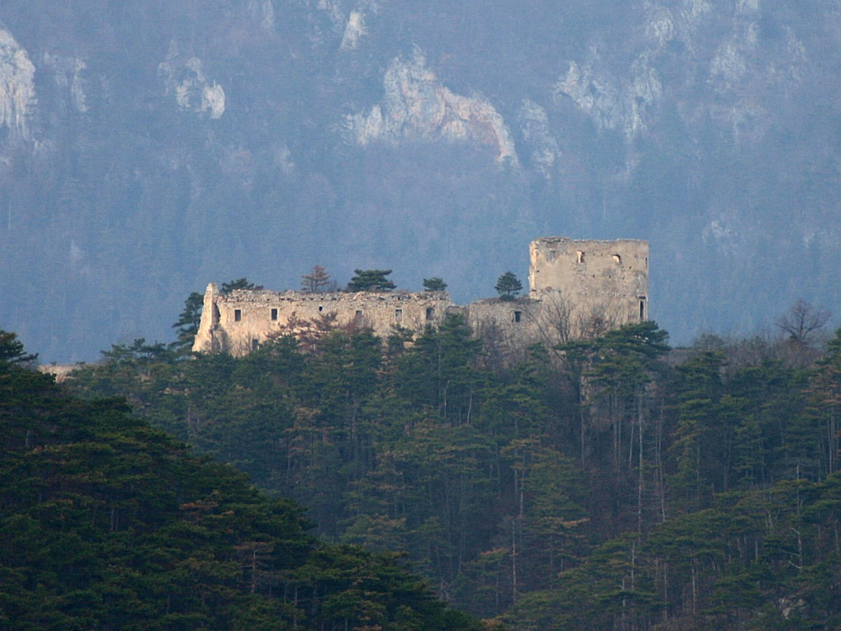 Winzendorf Burgruine Emmerberg (Bild 1)